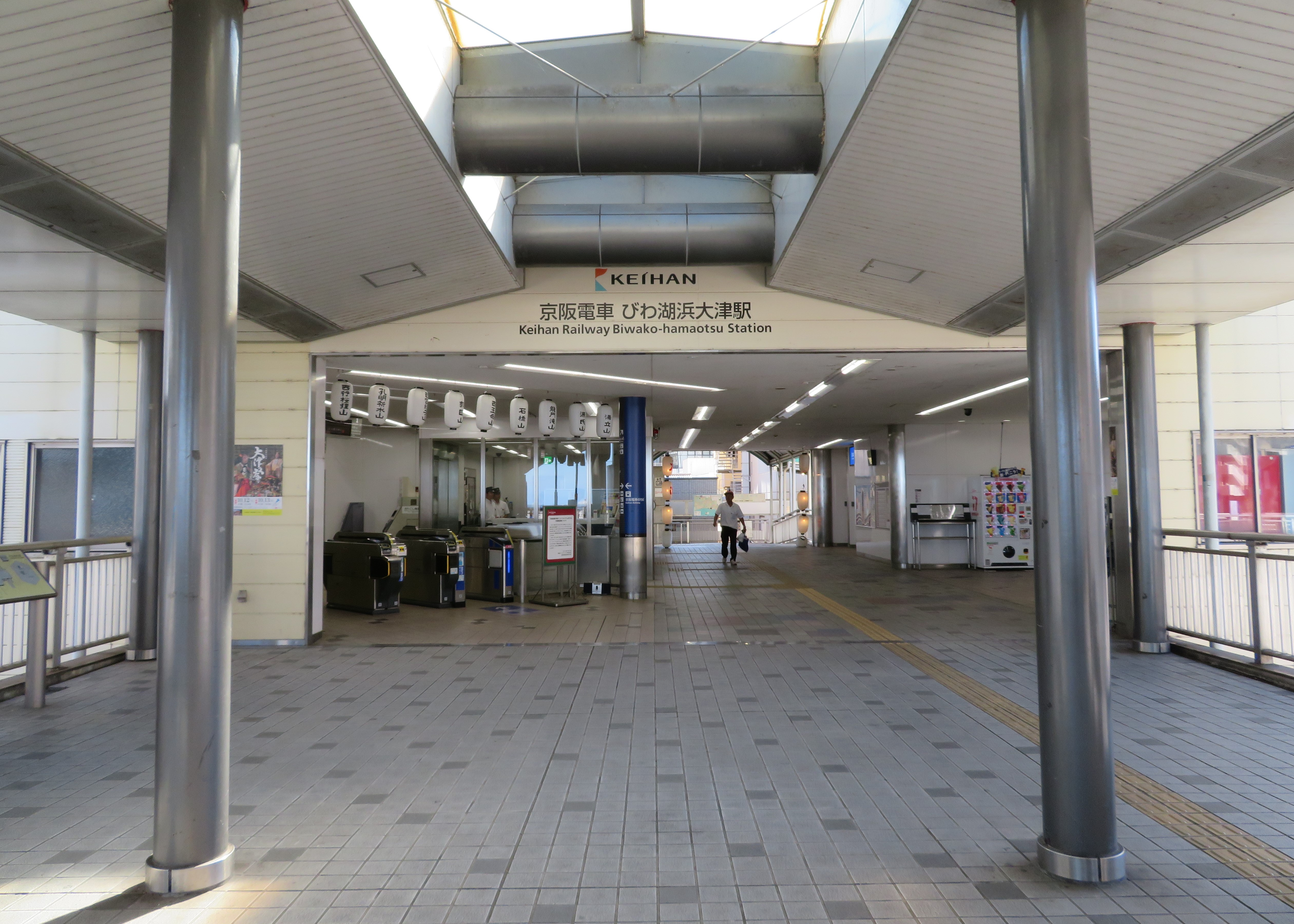 びわ湖浜大津駅北側入口